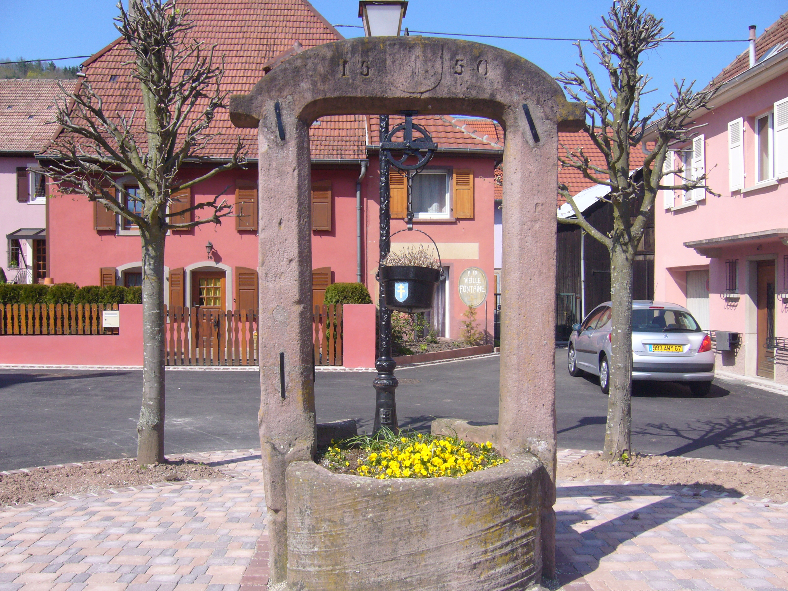 Fontaine Saint-Alexandre à Lièpvre (année 1550)